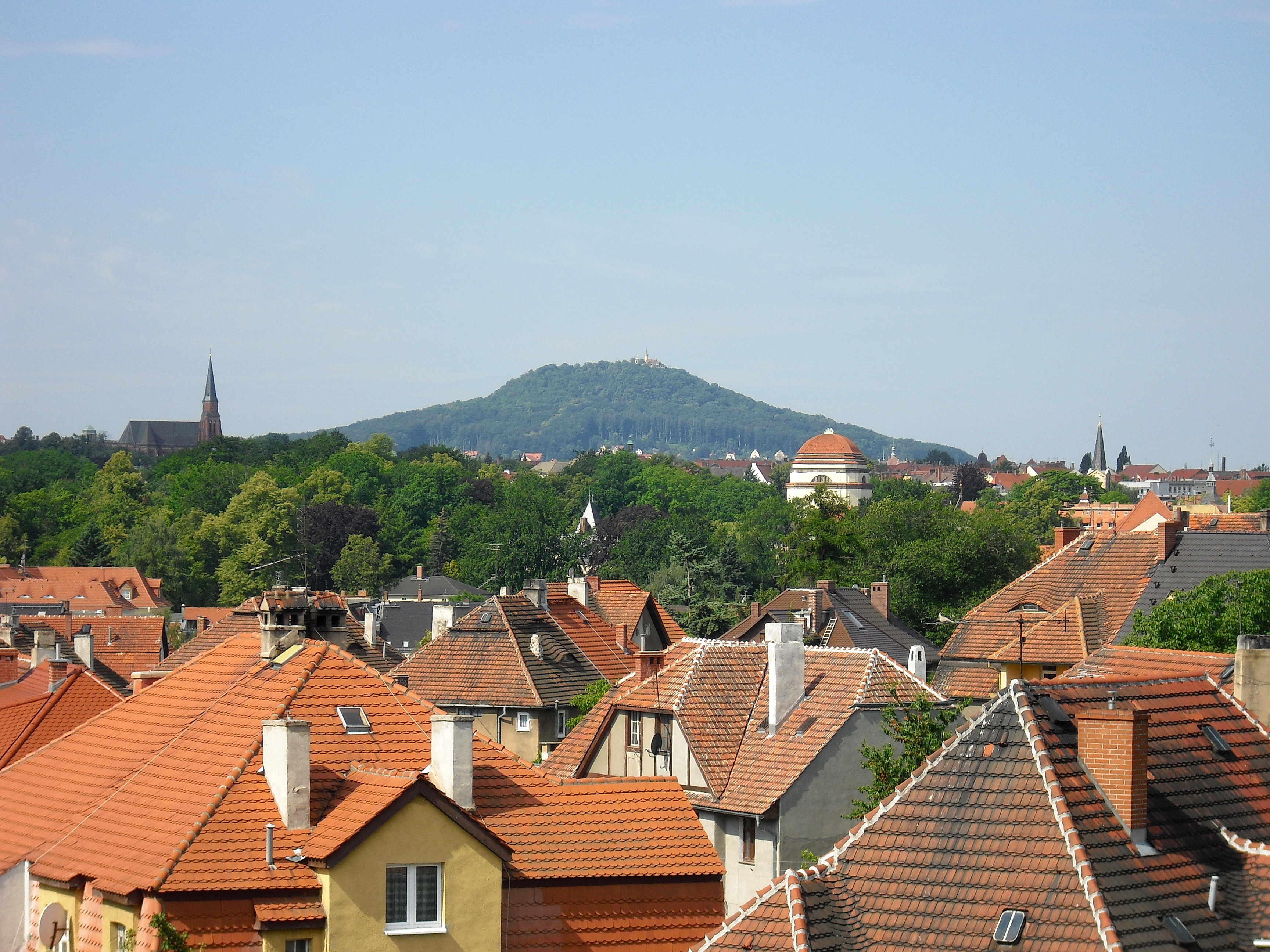 Landeskrone, widok od strony Zgorzelca. Hornjoserbsce: Wid na Sedło z pólskeho dźěla Zhorjelca.